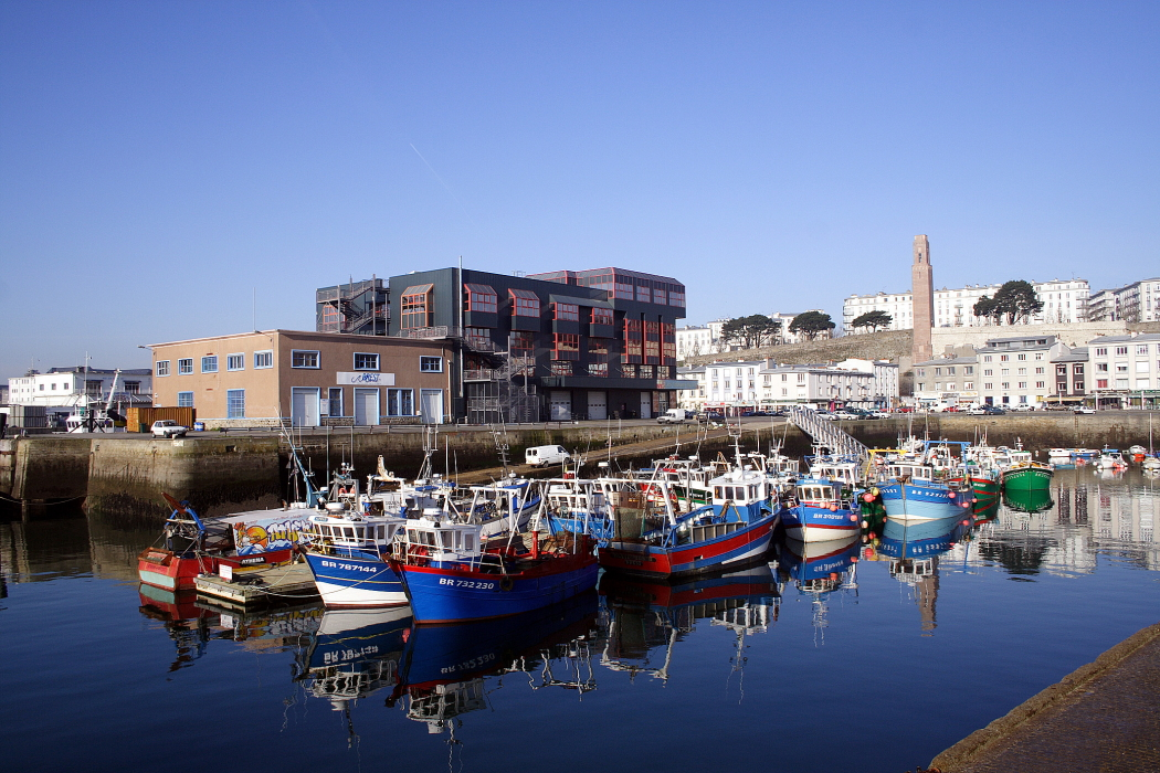 Port de pêche de Brest, bâtiment "Grand Large" et Monument Américain